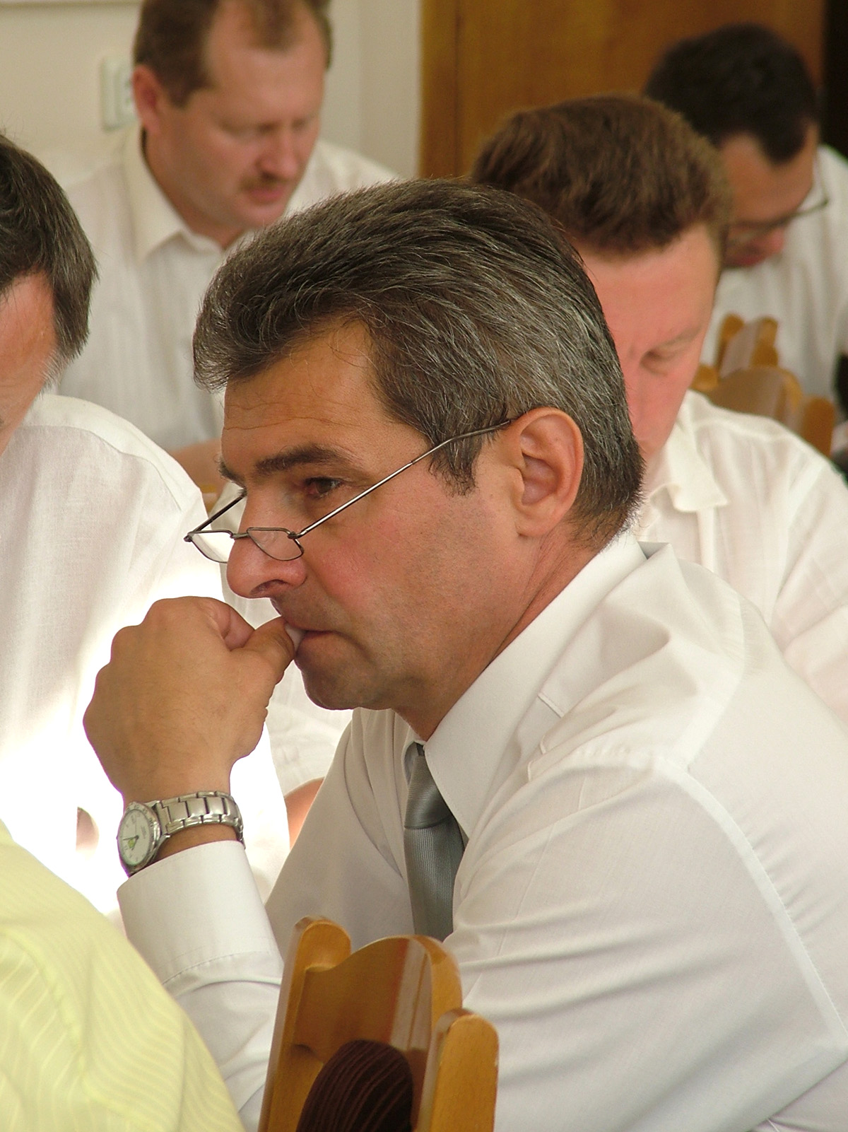 Олександр Остапчук на сесії Тернопільської міської ради.